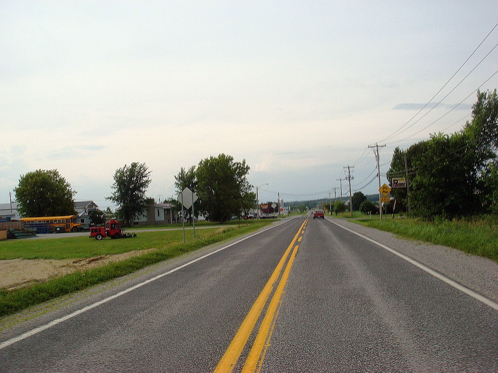 Photo de la route 139, à Acton Vale, Québec, Canada.